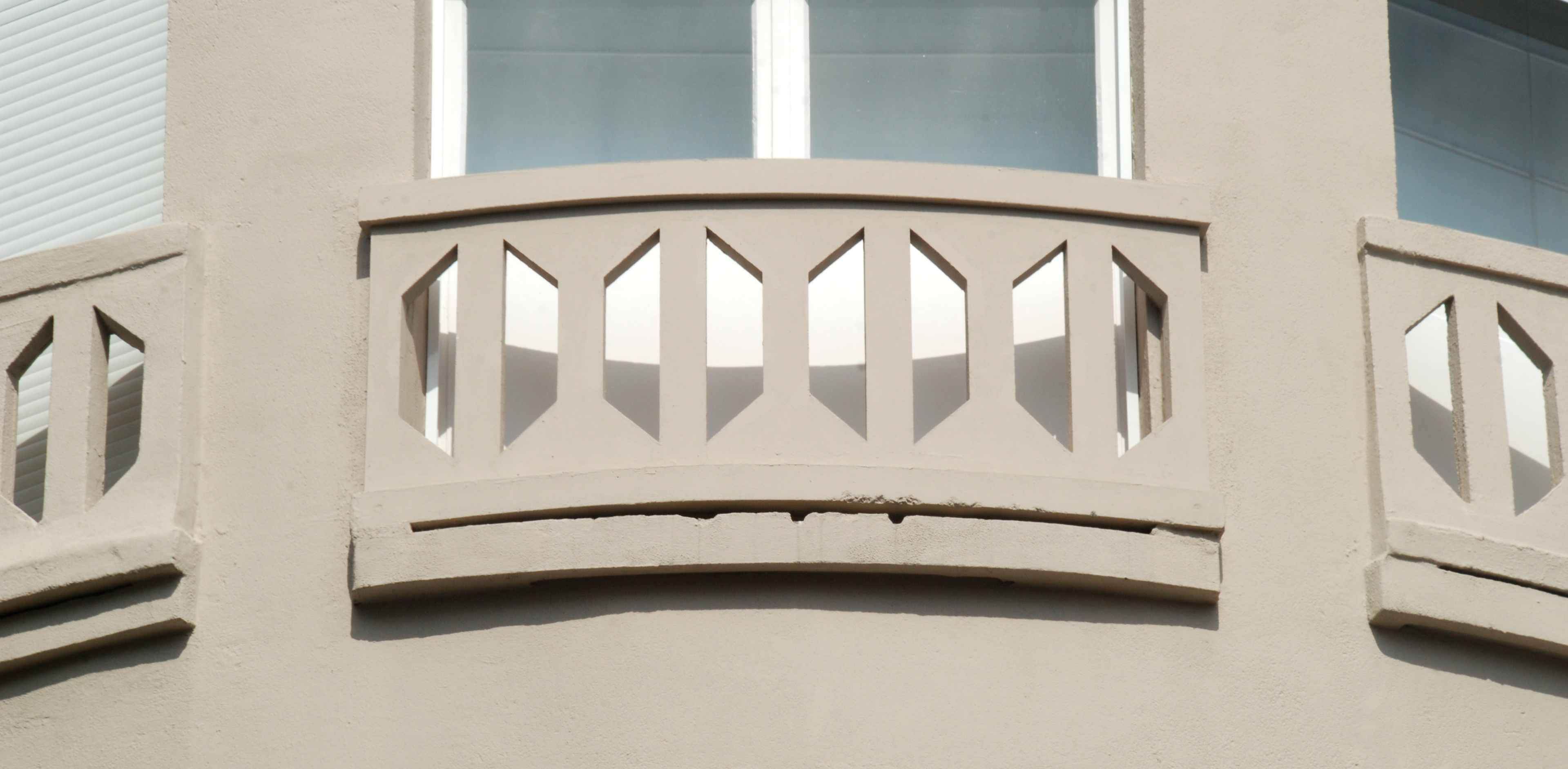 Belgique - Bruxelles - Place Georges Brugmann n°12-18 - architecte Paul Picquet - Immeuble à appartements de style Art Déco (1928-1929)